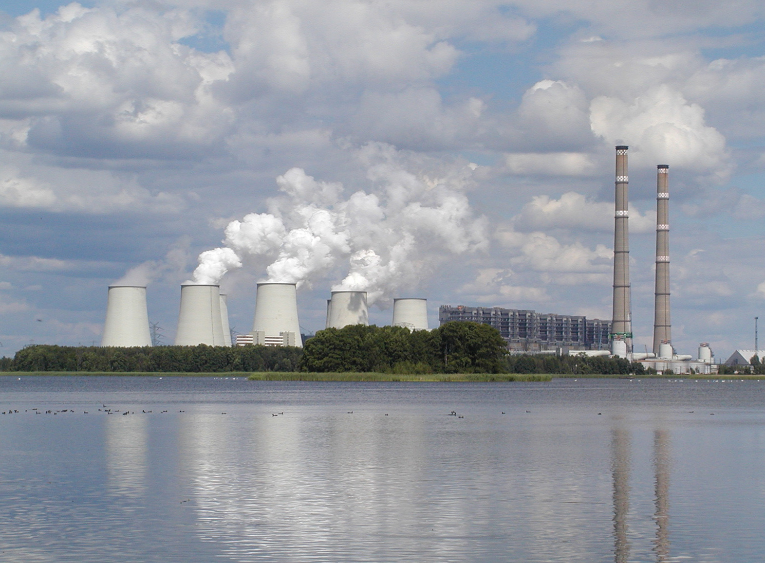 Das Kohlekraftwerk Jänschwalde im Sommer. Blick über die Peitzer Fischteiche.